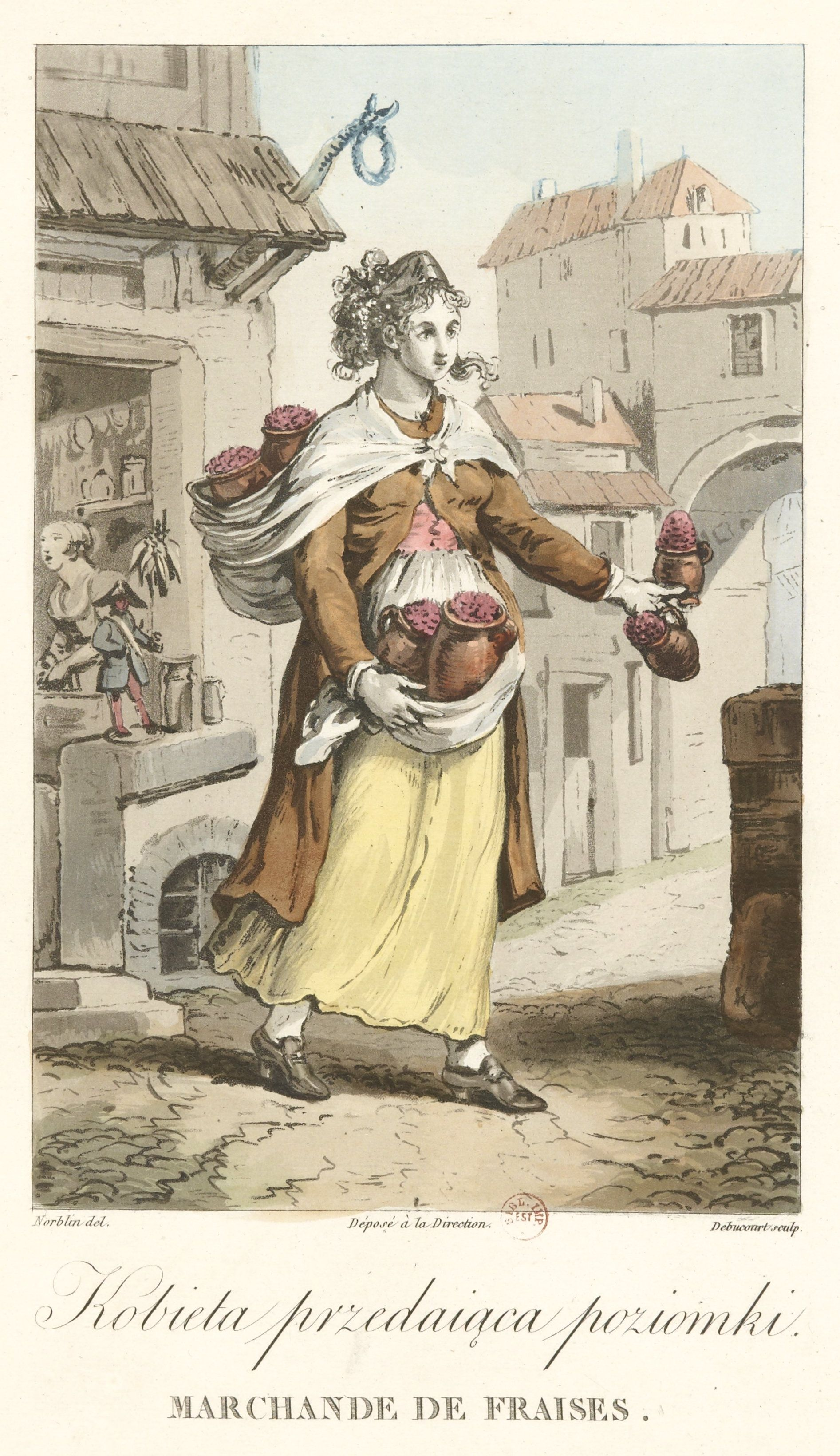 Торговка клубникой